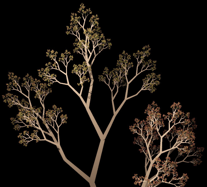 Fraktalträd, skapat med ett L-system.